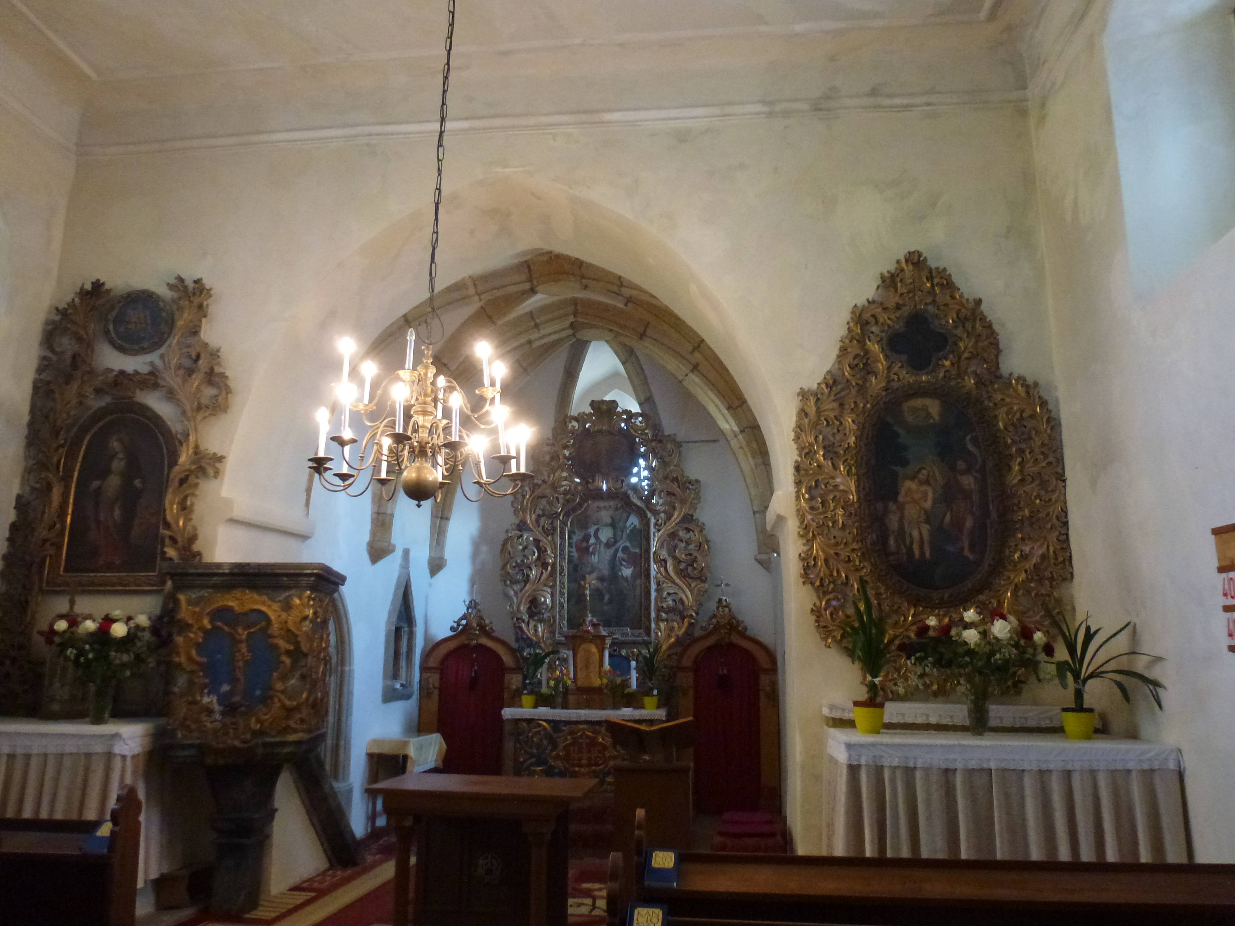 Interier